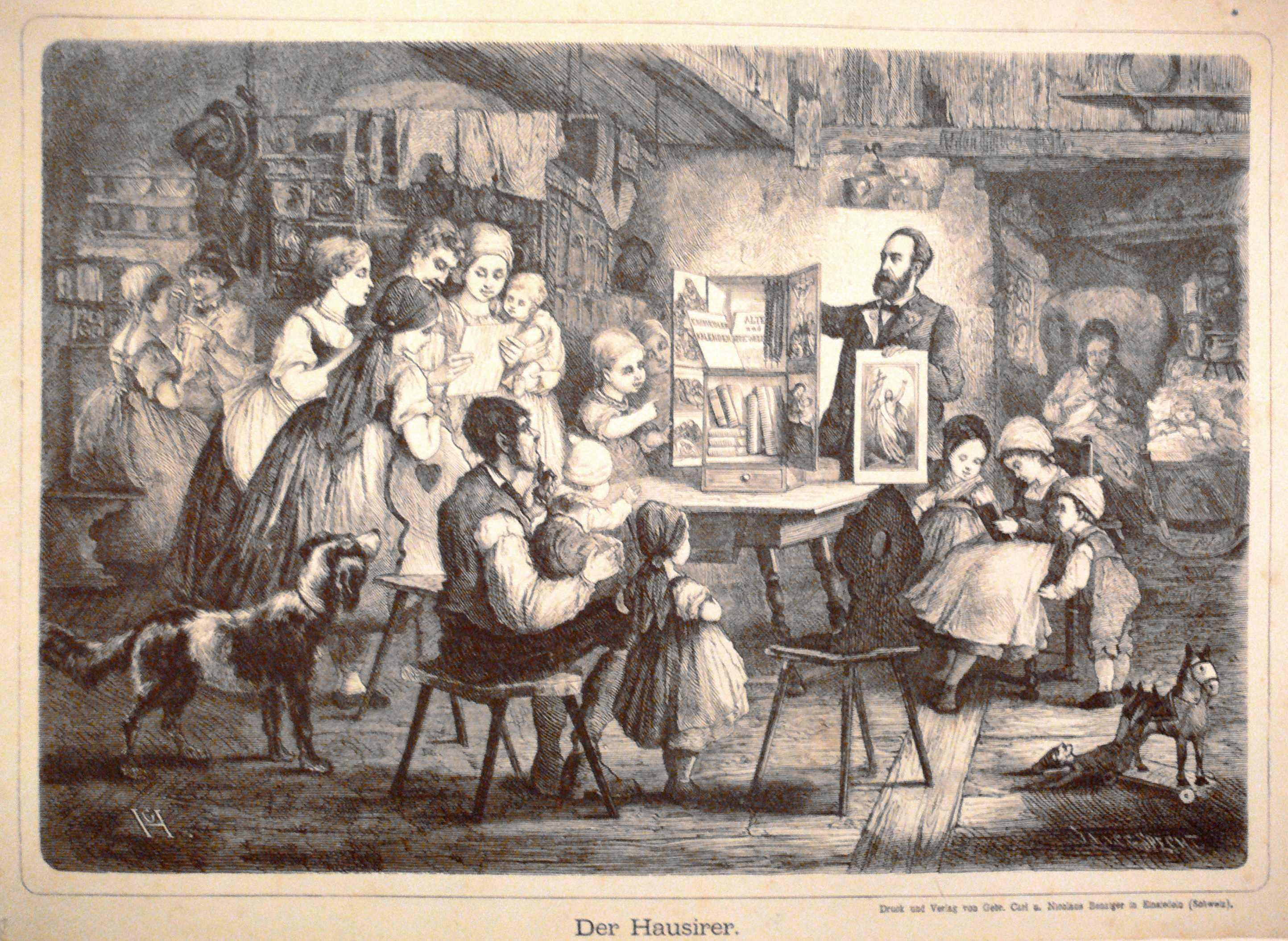 Der Hausirer (Druck und Verlag Benziger, Einsiedeln) Landesmuseum Württemberg (Außenstelle Museum für Volkskultur in Württemberg, Waldenbuch)